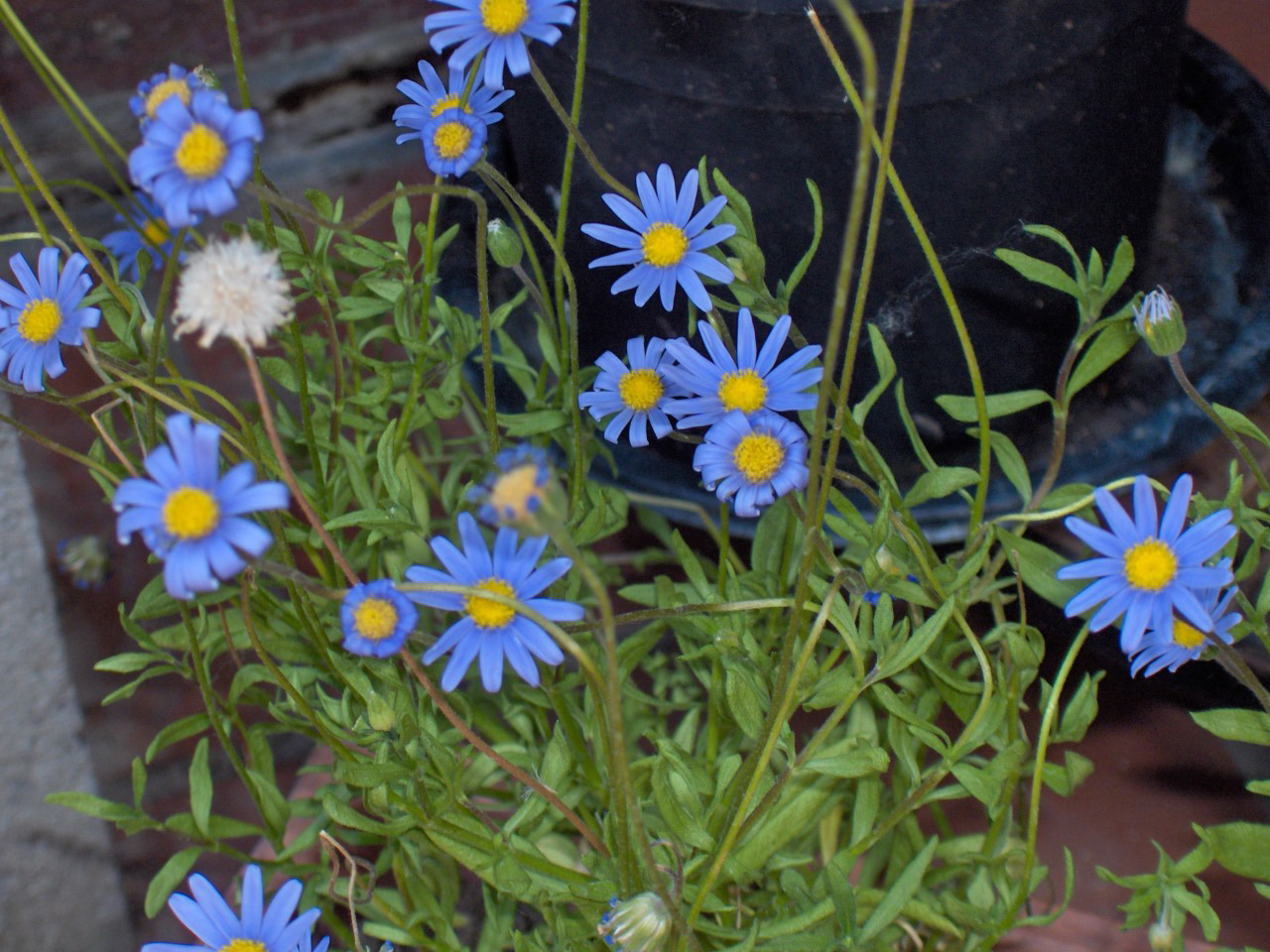 Felicia amelloides, Asteraceae